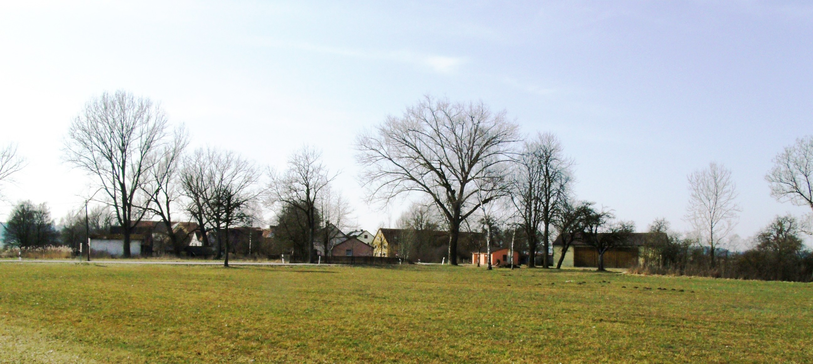 Röttenbach, Ortsteil der Stadt Leutershausen im mittelfränkischen Landkreis Ansbach